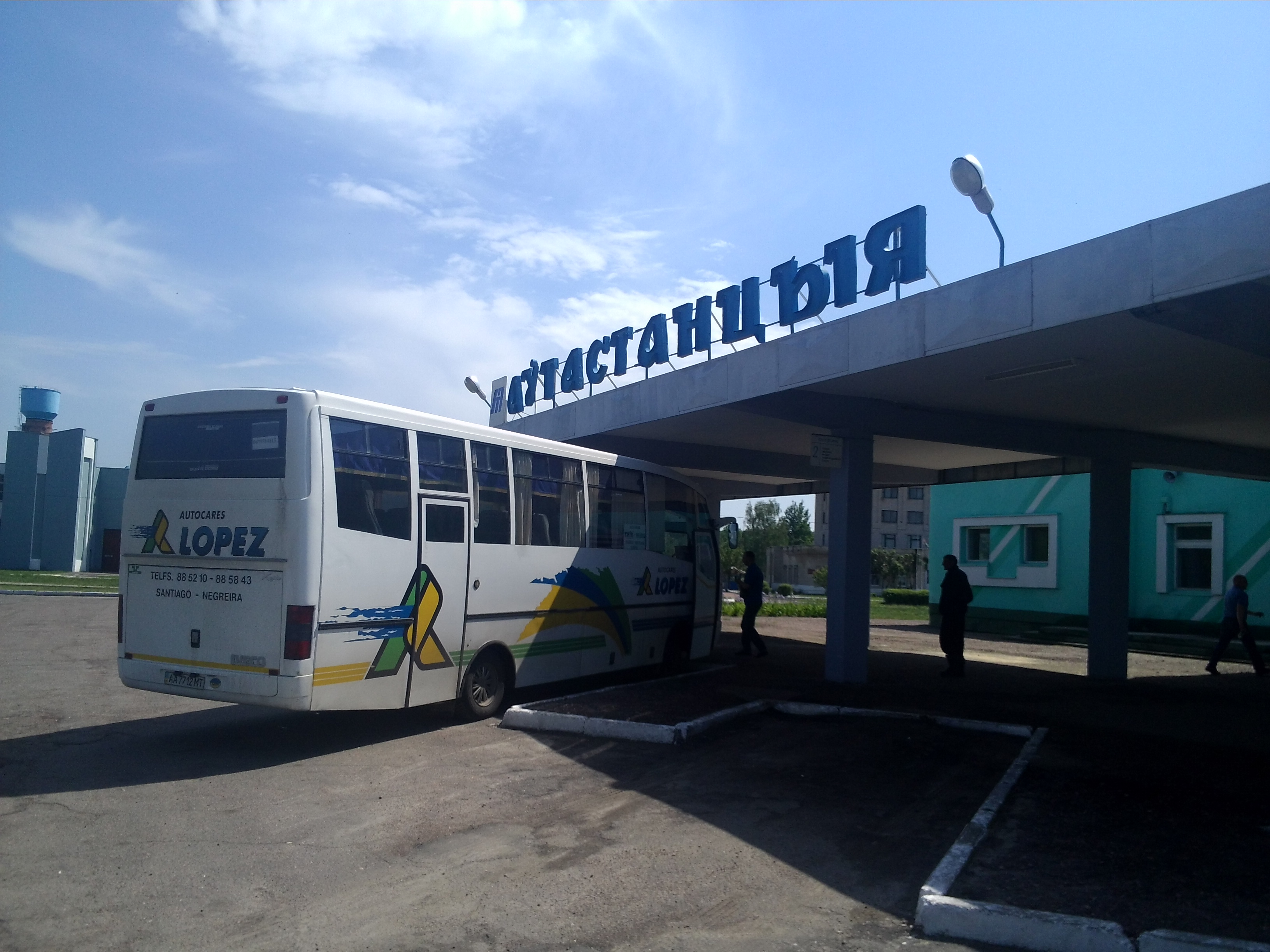 м. Наровля